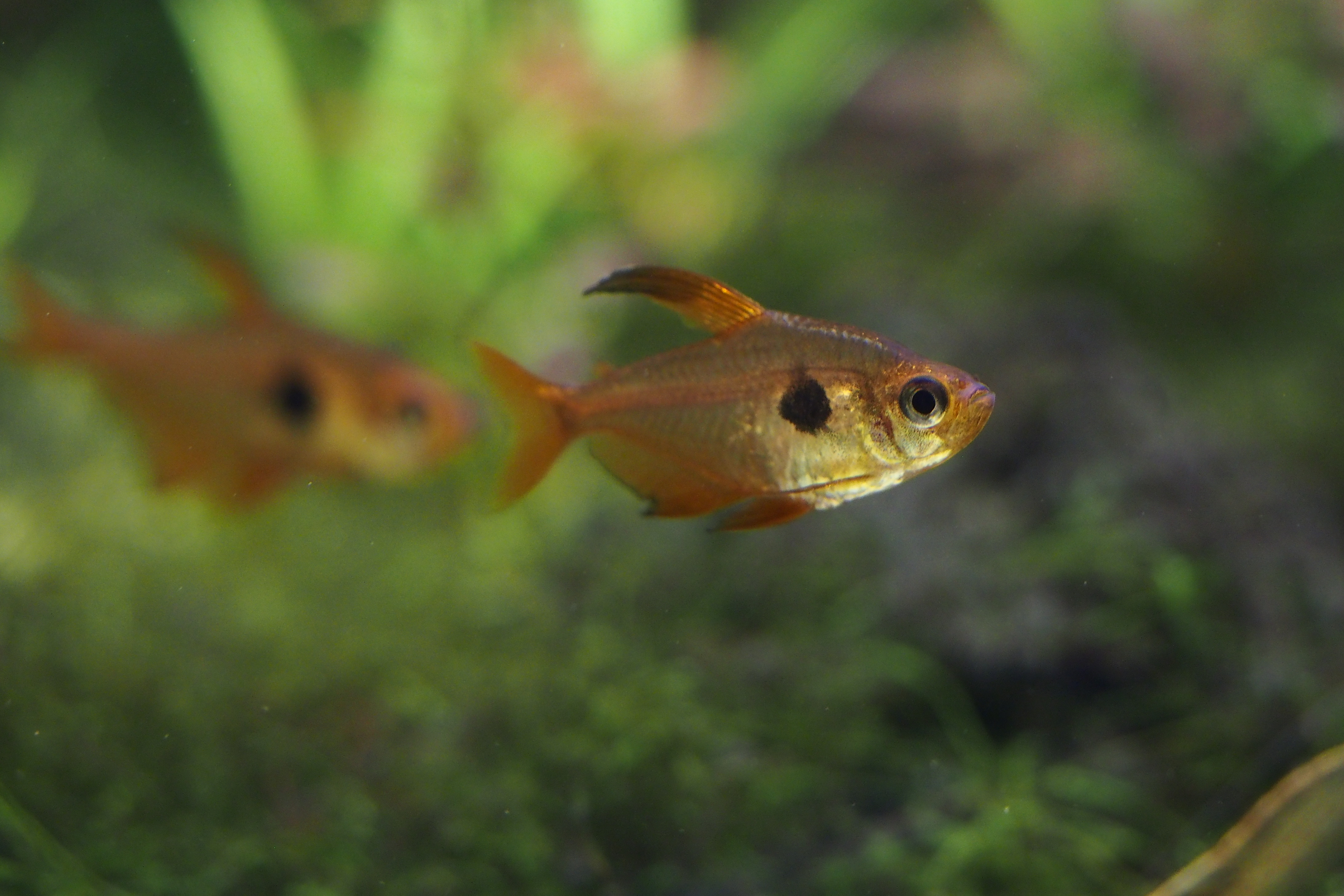 at Suma aquarium.